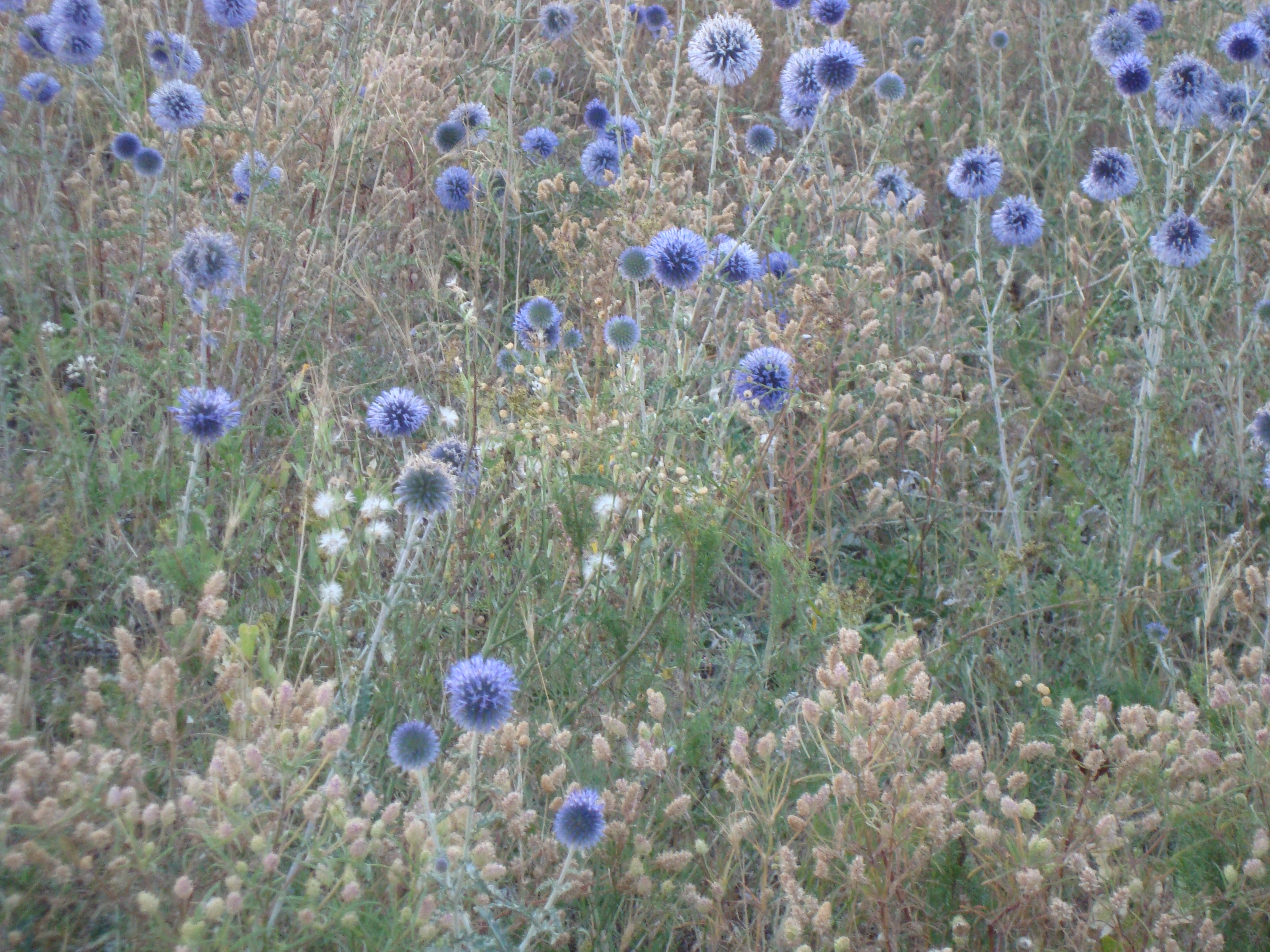 «Кінбурнська коса», Очаківський р-н